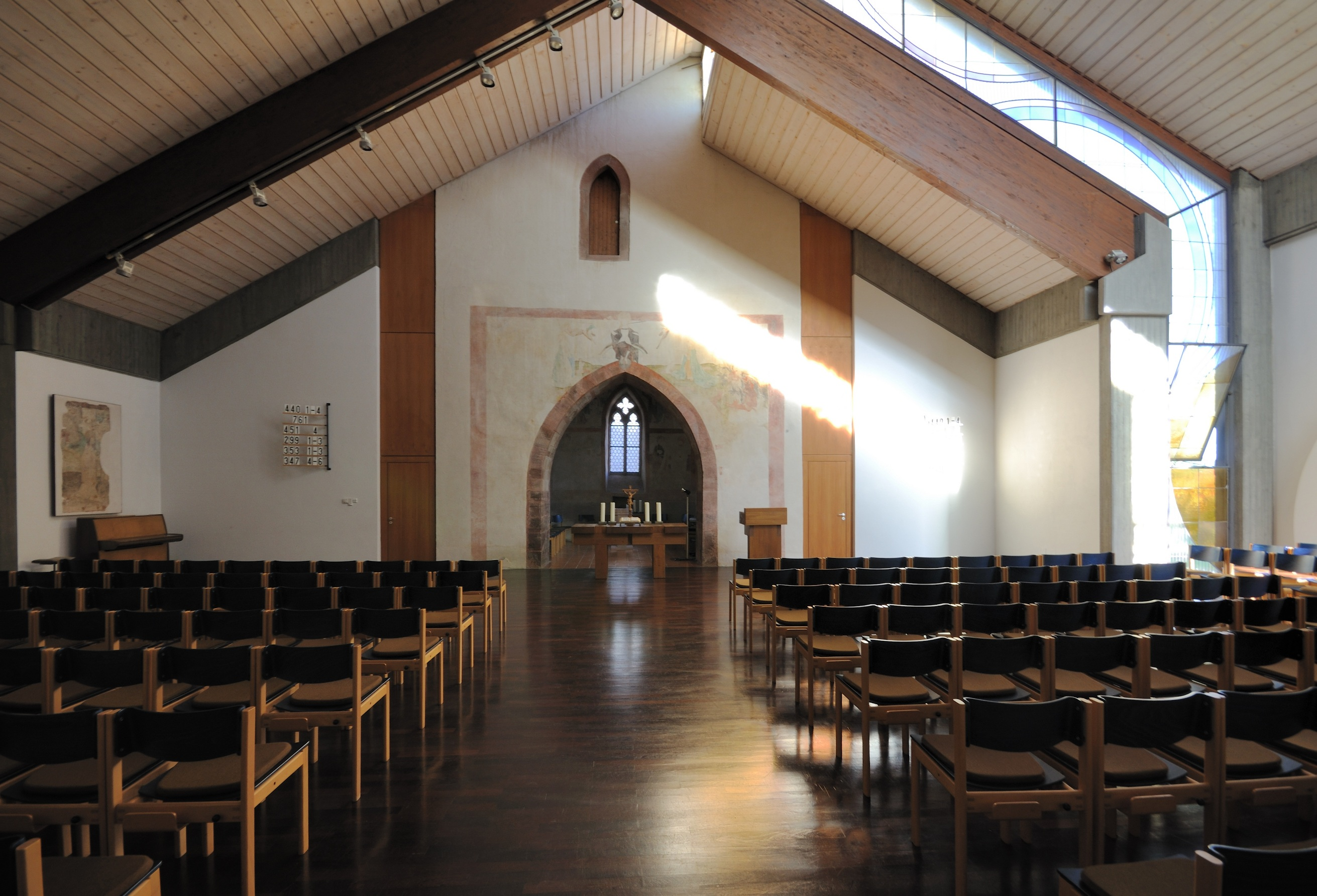 Evangelische Pfarrkirche Tannenkirch: Blick ins Kirchenschiff